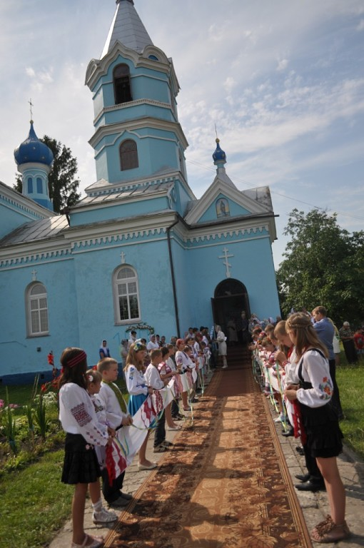 Фото зроблене на 100-річчя Церкви.